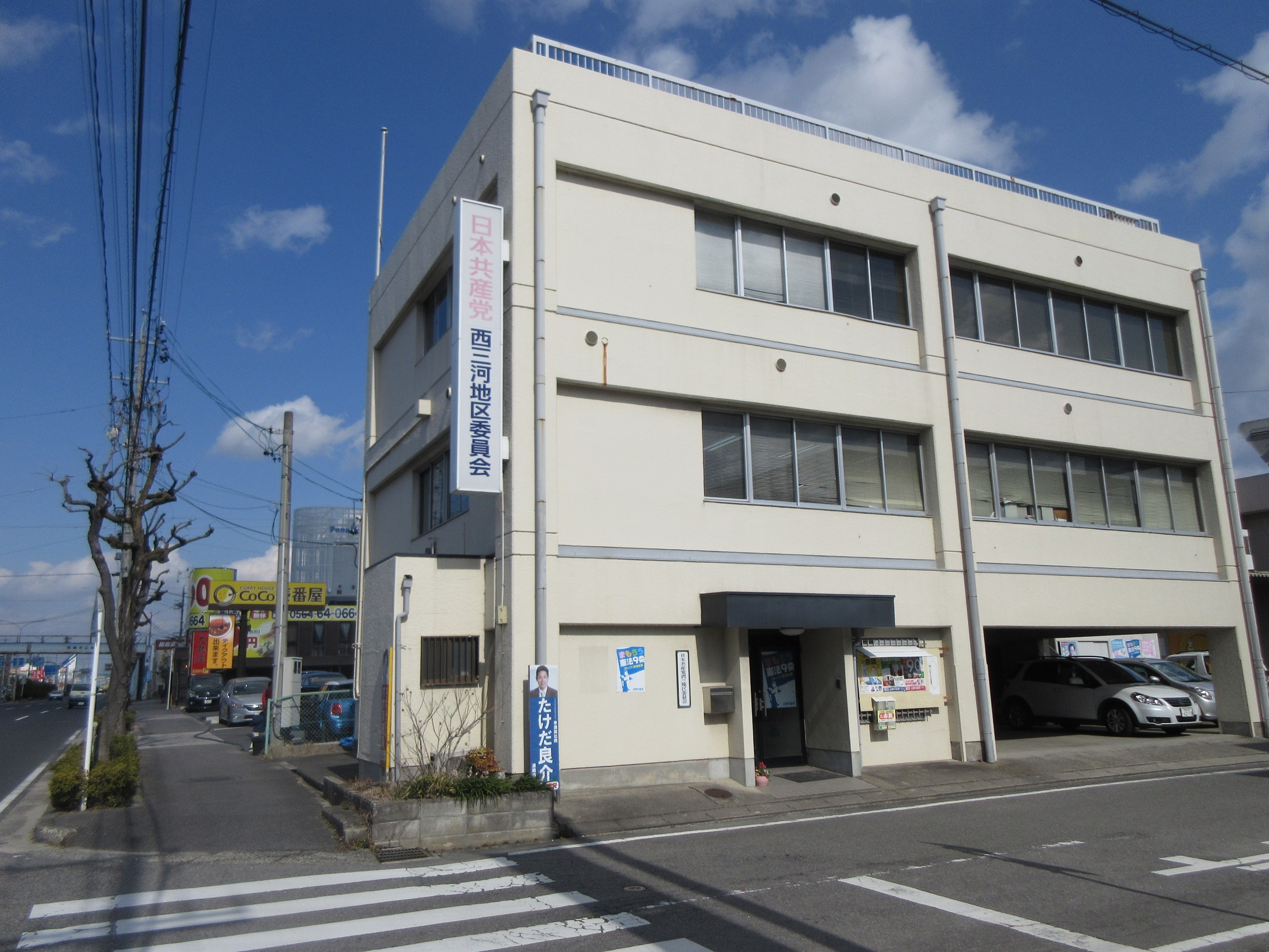 日本共産党西三河地区委員会（岡崎市広幡町）